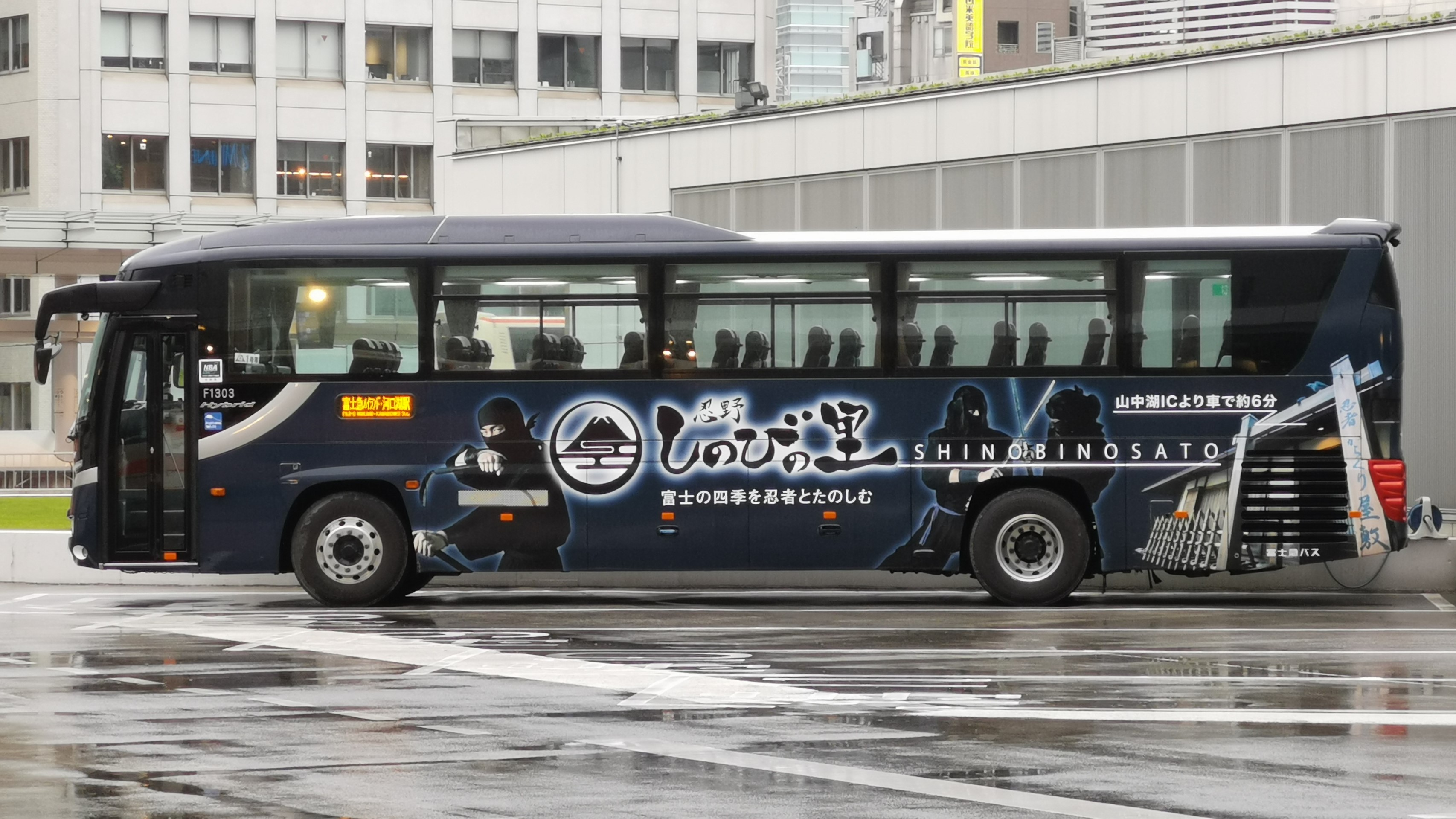 忍野 しのびの里の広告をラッピングした富士急バスの高速バス車両。バスタ新宿にて撮影。